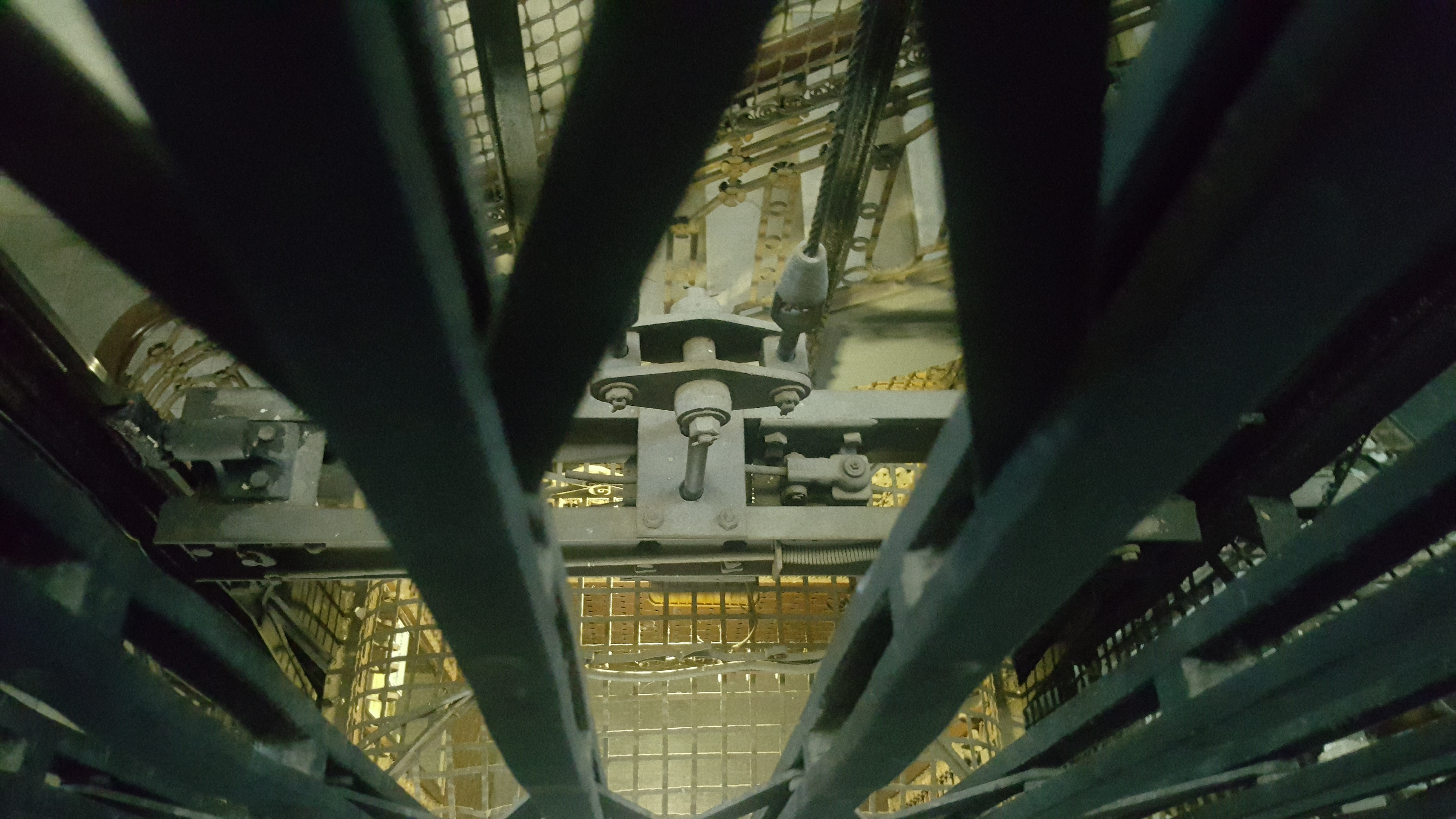 Edificio: Casa monserrat